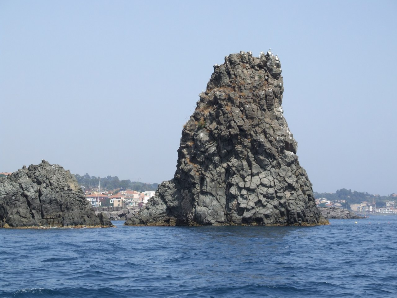 Faraglione Medio, Isole dei Ciclopi, Sicilia, Italy